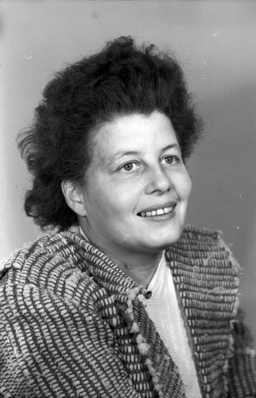 Ilse Weintraut-Rinka (Ilse Rodenberg) Kandidatin zur Wahl der Volkskammer (Bezirk Potsdam); Ilse Weintraut-Rinka, Intendantin am Hans-Otto-Theater in Potsdam [Porträt Ilse Rodenberg (geb. Haupt, früher Ilse Weintraut-Rinka)] Abgebildete Personen: Rodenberg, Ilse: Intendantin, KPD, KZ, 1946 Übersiedlung SBZ, NDP, DDR